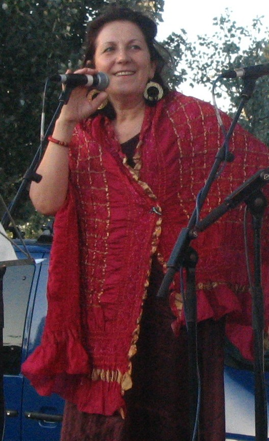 Роса Сарагоса